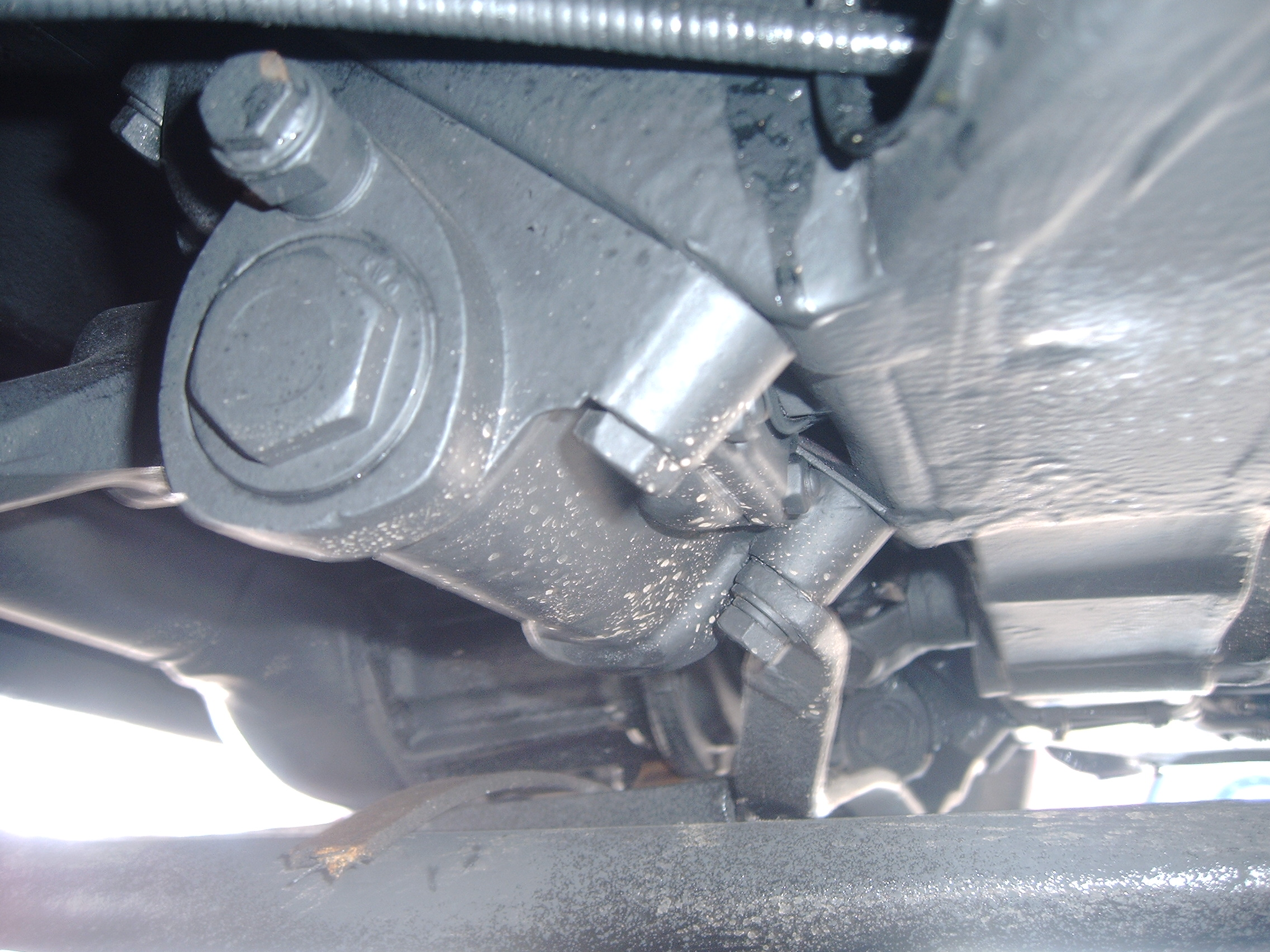 Eisenach, EMW 340-hinterer Stossdaempfer